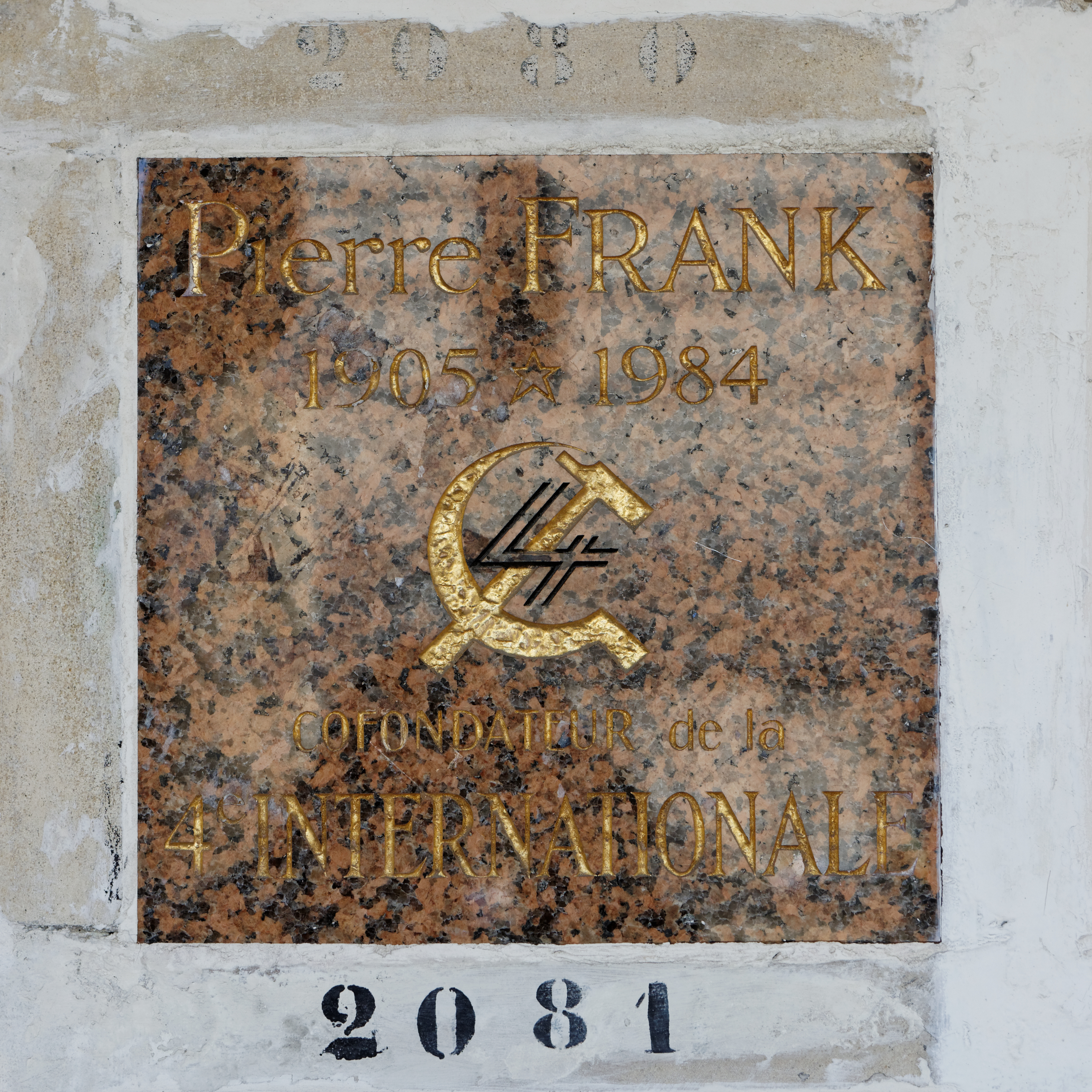 Case du columbarium du cimetière du Père-Lachaise.